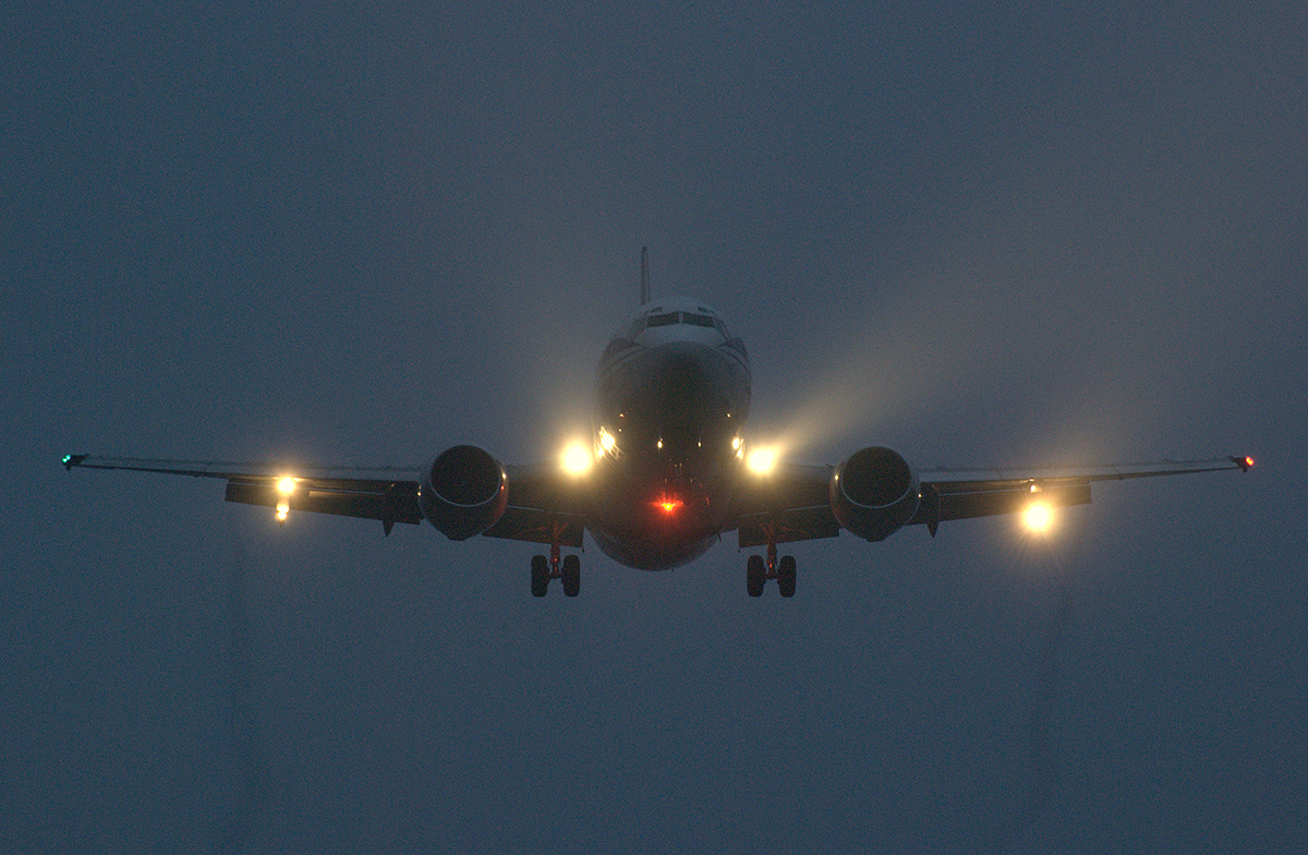 "BelAvia" B-737